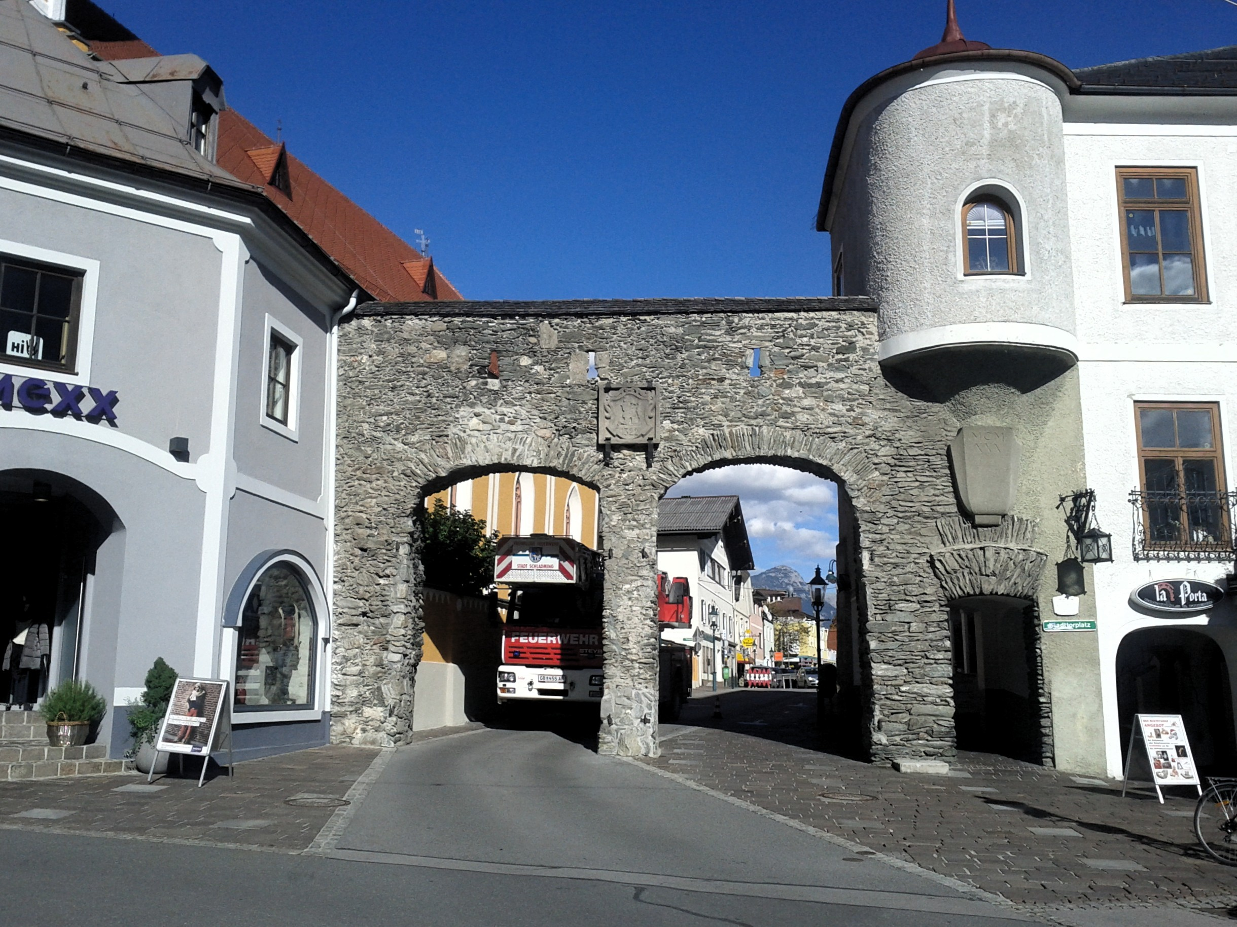 Ehem. Salzburger Tor